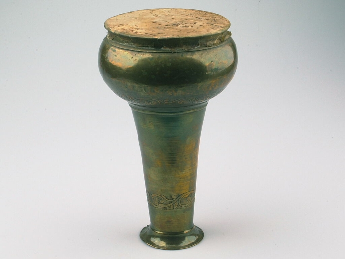 Het vel van deze bekertrom is op het tromlichaam van messing gelijmd. De onderkant van het tromlichaam is open.